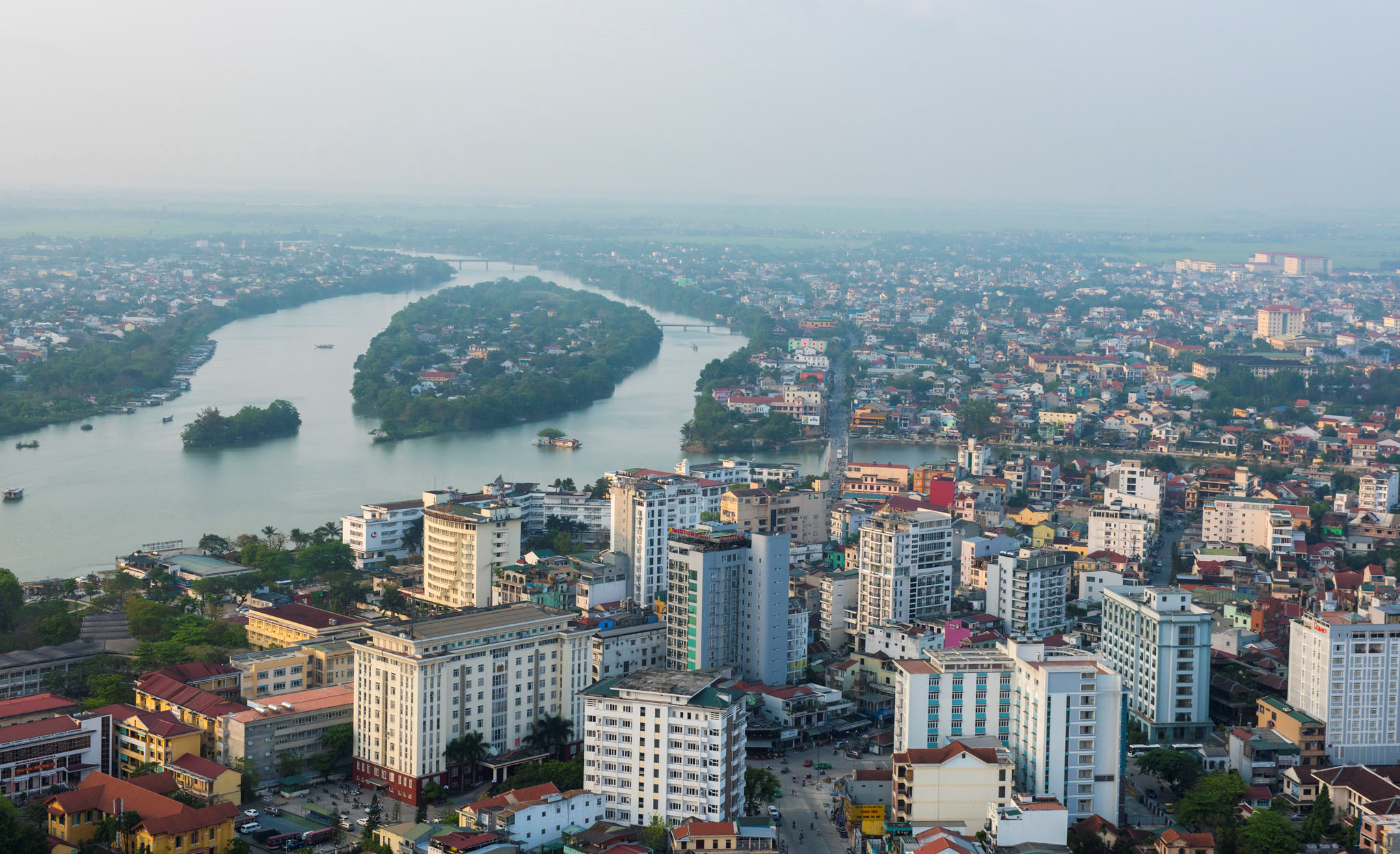 Bờ Nam của thành phố Huế nhìn từ trên cao